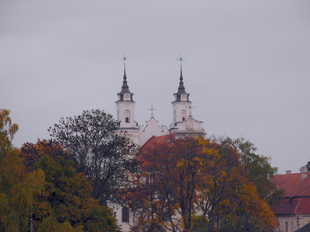 Church in Jeruzalė (Vilnius)